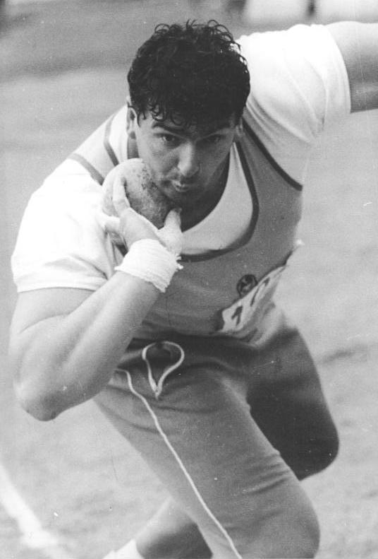 Udo Beyer ADN-ZB Thieme 12.05.1984 Erfurt:Leichtathletik-Sportfest-Kugelstoß-Weltrekordler Udo Beyer erzielte glänzende 21,54 m. Damit errang der ASK-Athlet den Sieg in seiner Disziplin. Abgebildete Personen: Beyer, Udo: Kugelstoßer, DDR